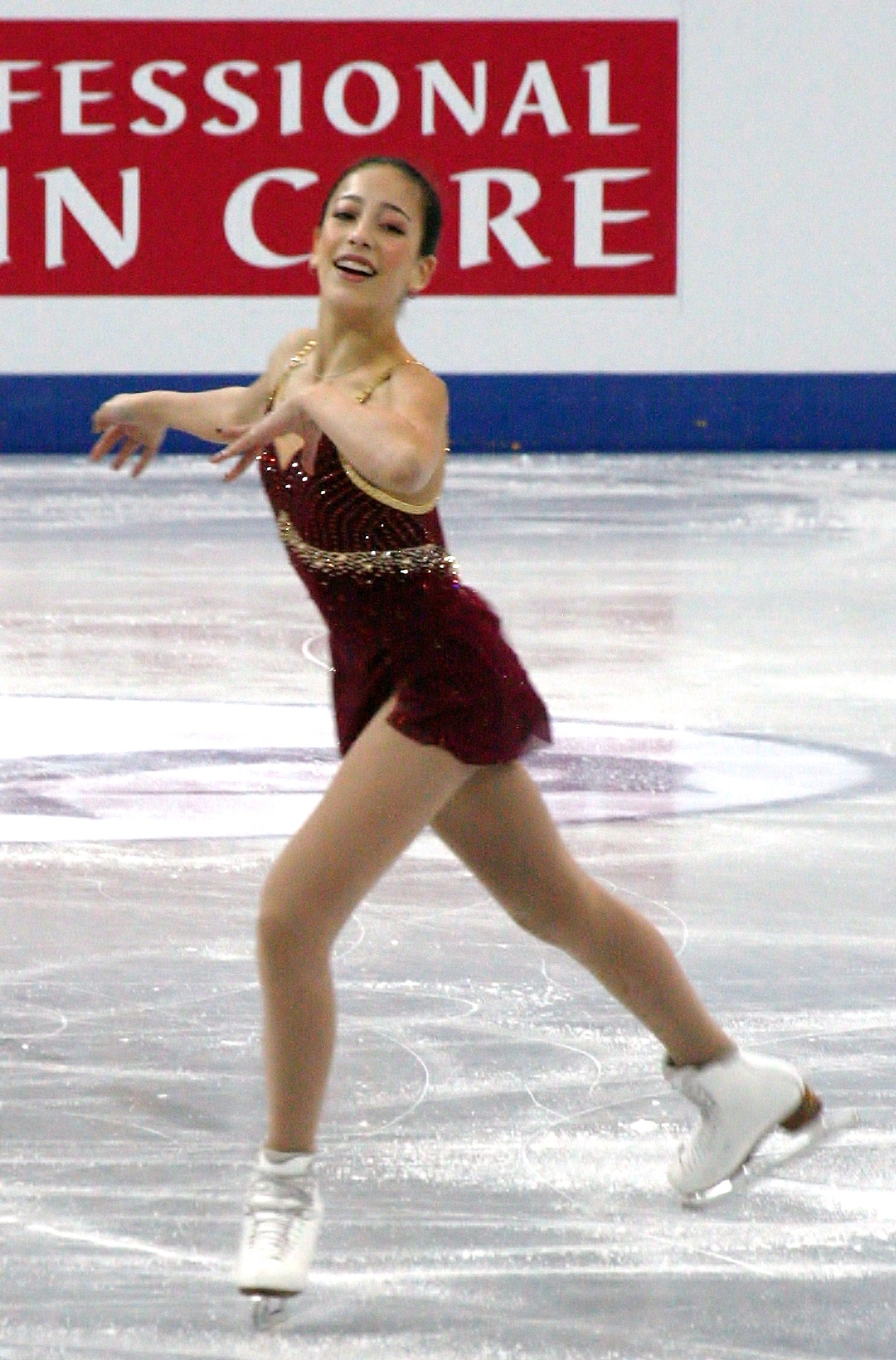 Леа Кейзер (США) на финале Гран-при среди юниоров 2012-2013. Произвольная программа.